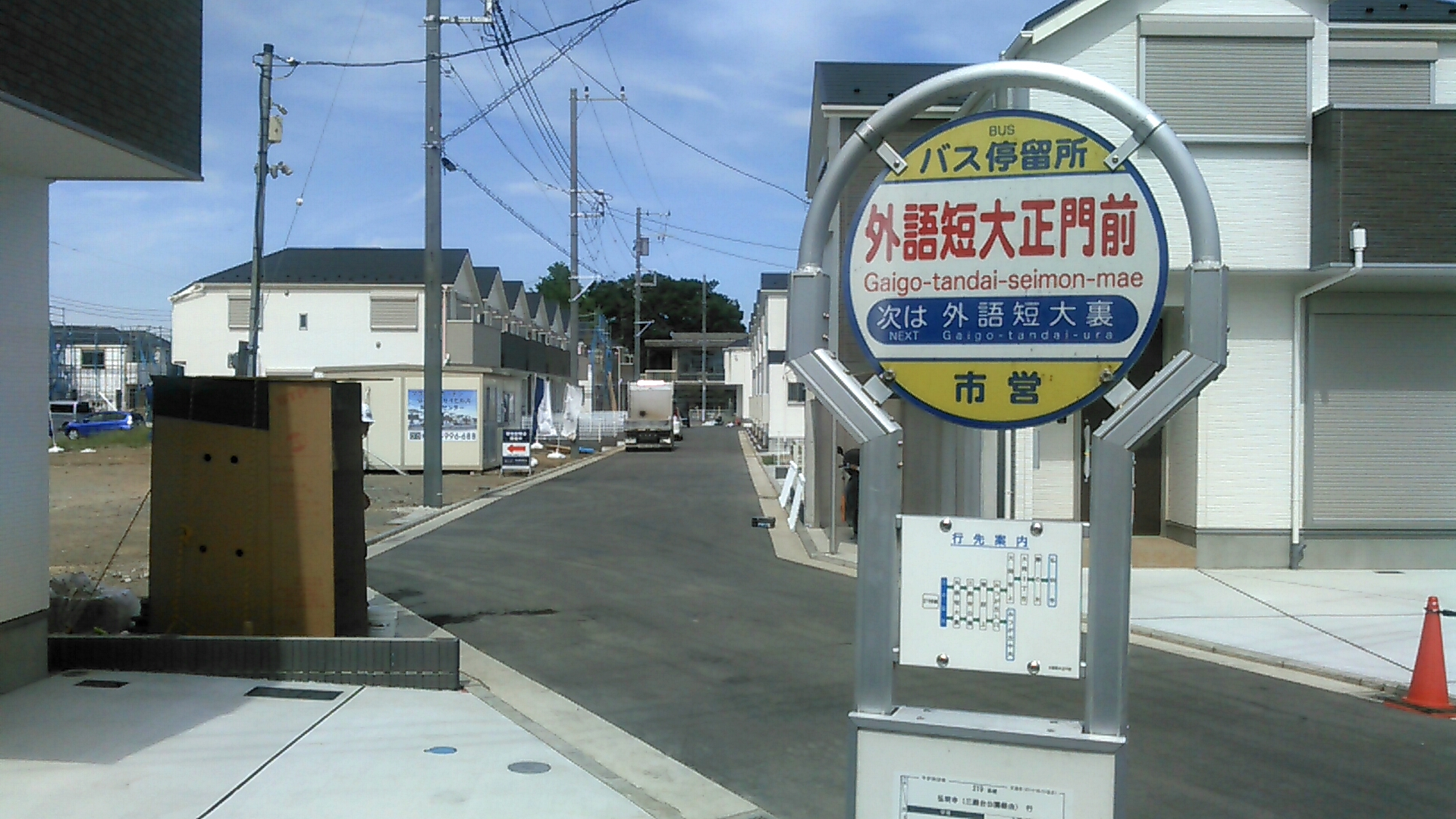 神奈川県立外語短期大学の跡地。 2011年4月には閉学したjp:神奈川県立外語短期大学を正門前バス停（神奈川県横浜市磯子区岡村4-15-1）より臨む。 校舎は取り壊されて、住宅地となっている。 閉校前の正門前は jp:file:Kanagawa_Prefectural_College_of_Foreign_Studies.jpgを参照。